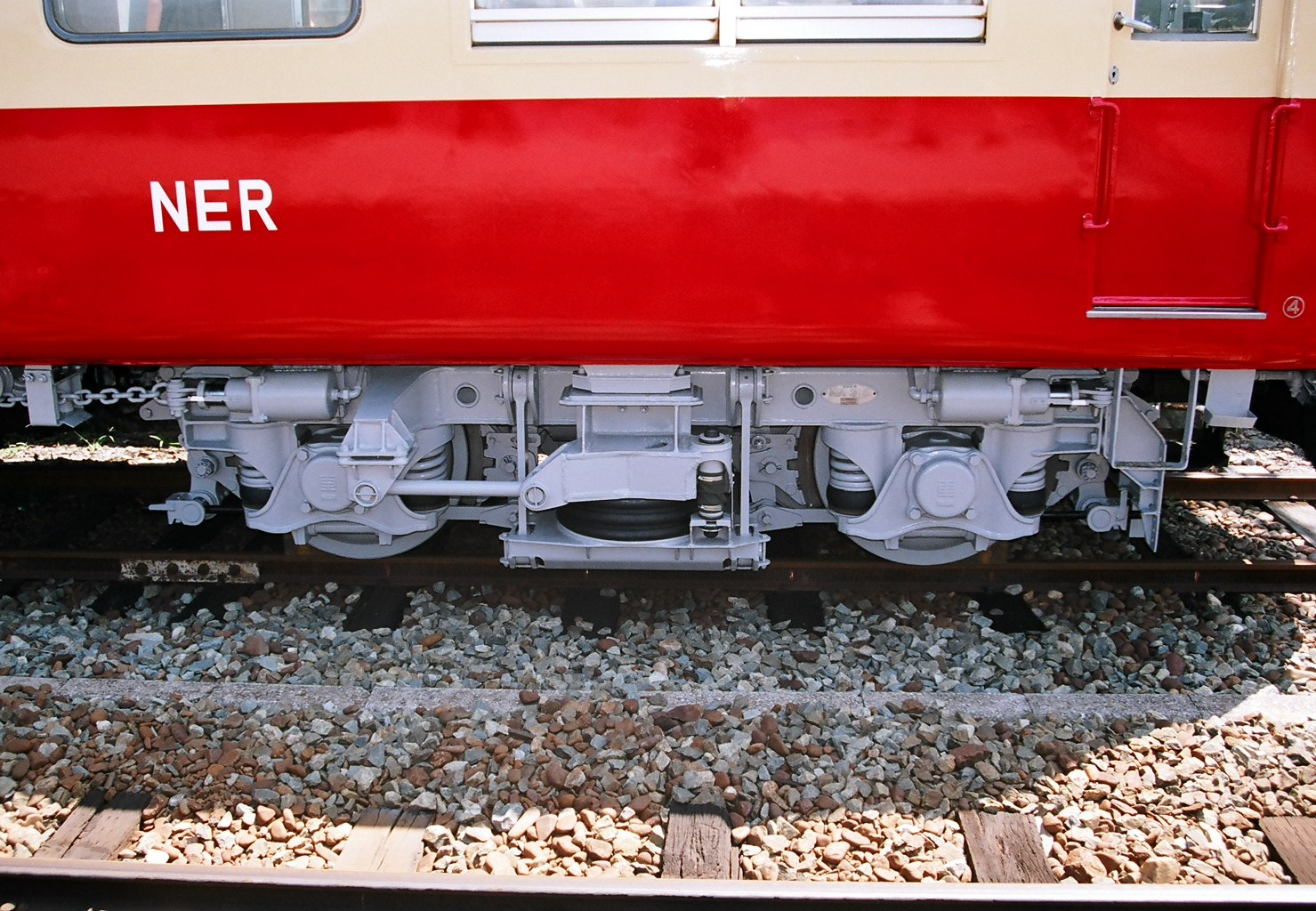 2000系第4編成NA315形台車